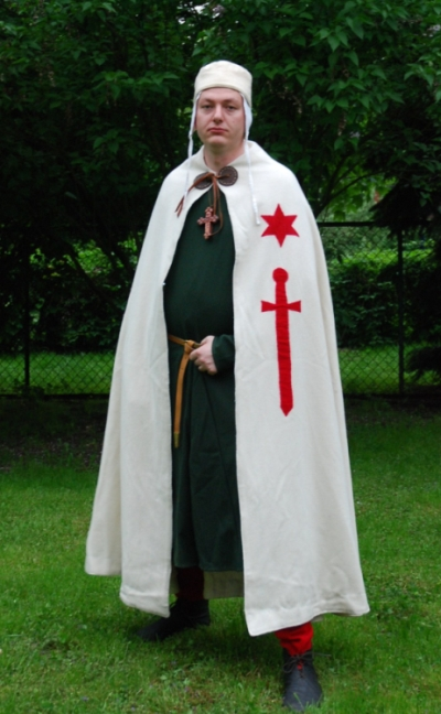 Rycerz w barwach Zakonu Braci dobrzyńskich rekonstrukcja stroju cywilnego.